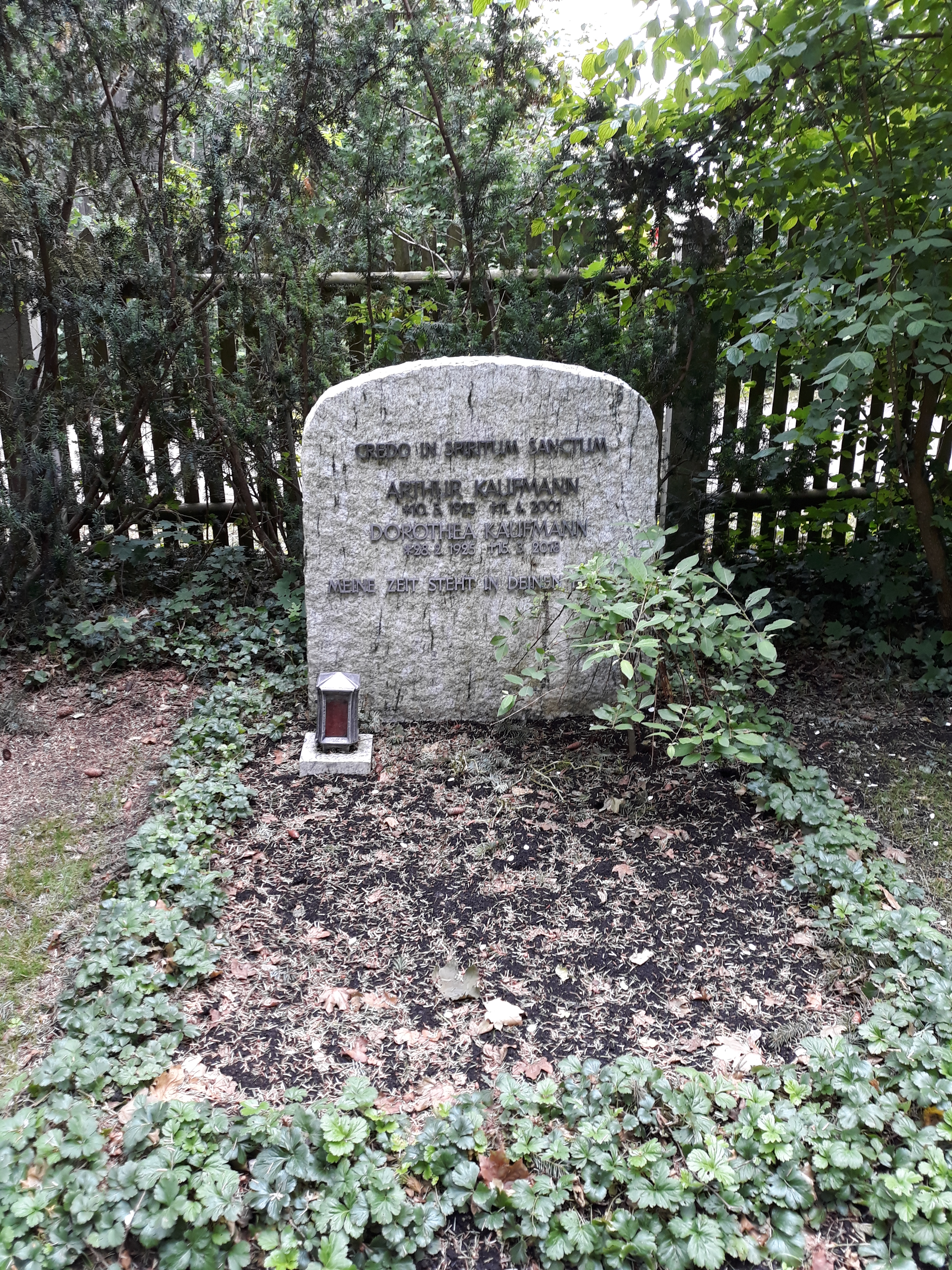 Das Grab des deutschen Strafrechtlers und Rechtsphilosophen Arthur Kaufmann und seiner Ehefrau Dorothea auf dem Friedhof Obermenzing, München.